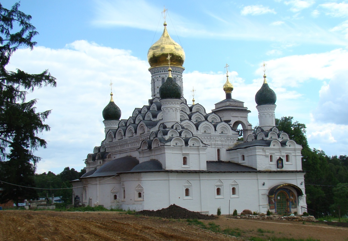 Eglise St.-Nicolas à Nikolo-Ourupino